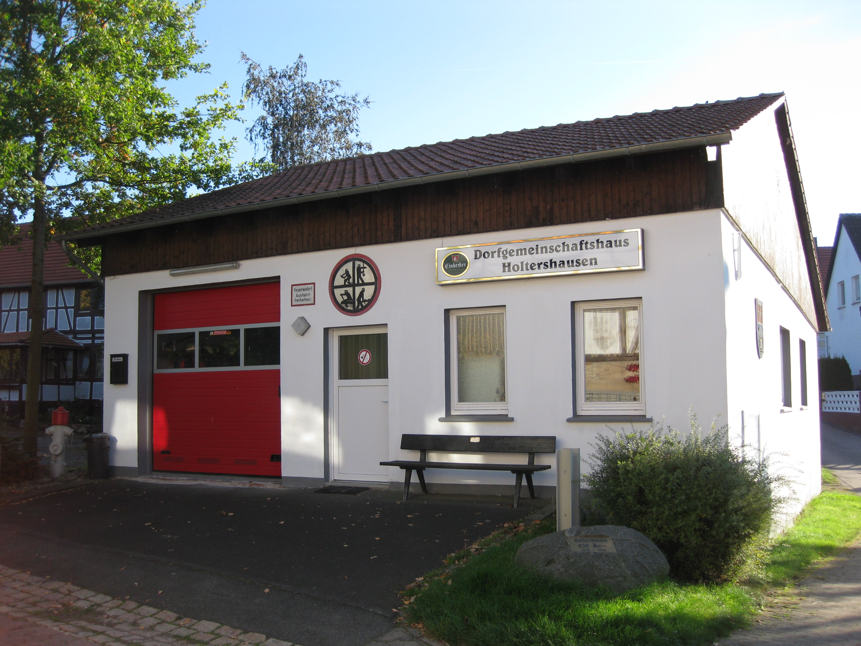 Dorfgemeinschaftshaus Holtershausen mit Feuerwehr